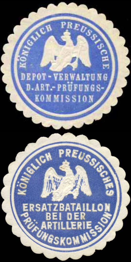 amtliche Siegelmarken der Artillerieprüfungskommission: Depot-Verwaltung und Ersatz-Bataillon